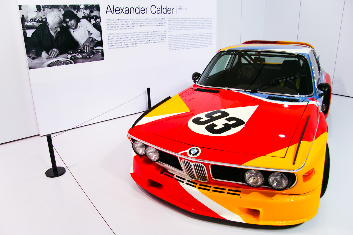 第一辆宝马艺术车，Alexander Calder创作的1975 BMW 3.0 CSL。